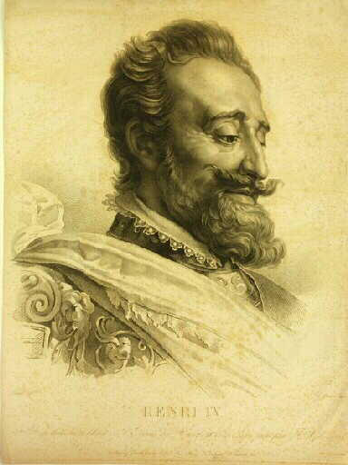 Portrait d'Henri IV, d'après le tableau Entrée de Henri IV à Paris de François Gérard